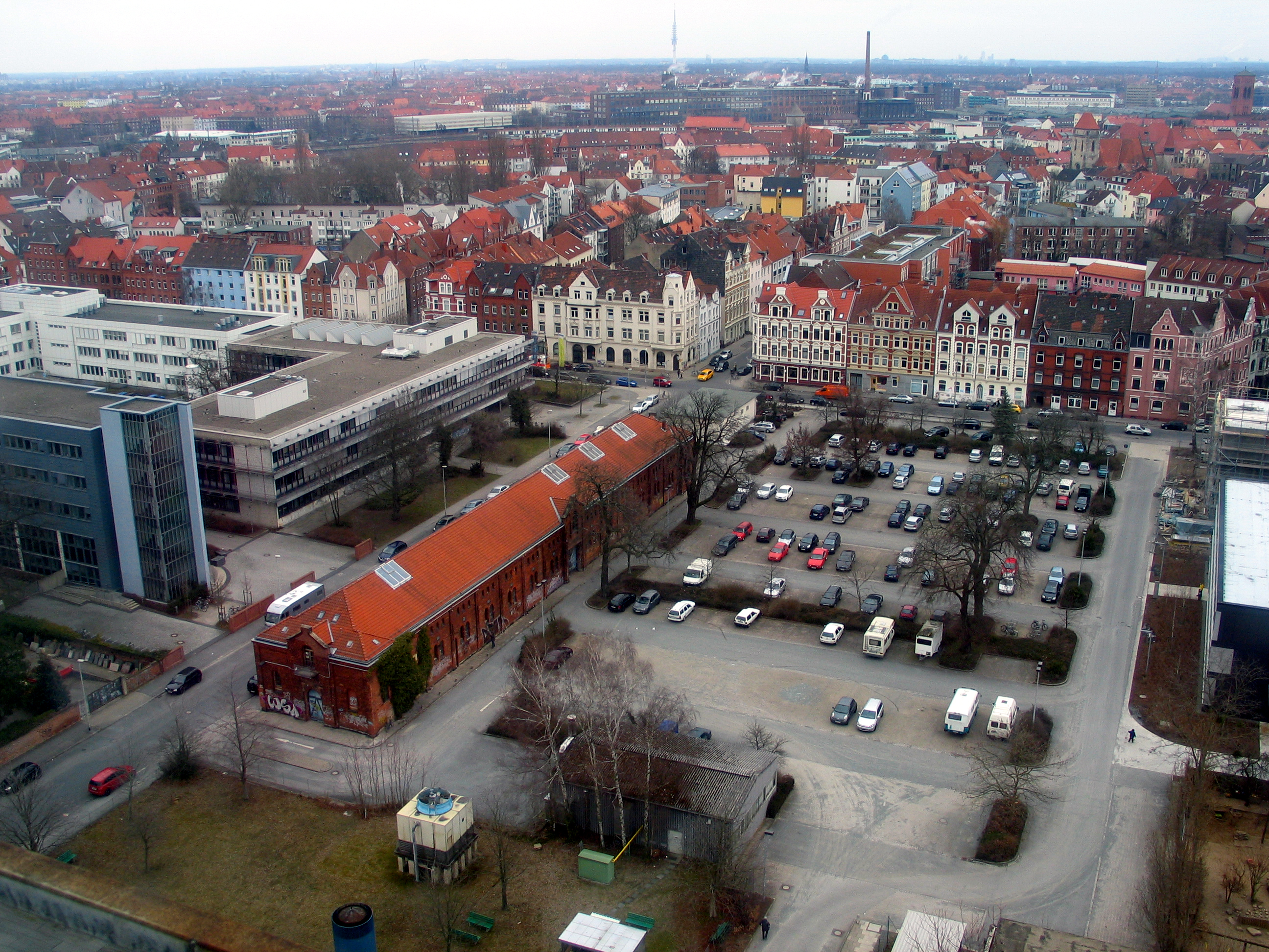 Von den ersten Gebäuden des 1. Hannoverschen Ulanenregiments Nr. 13 ist nur der denkmalgeschützte ehemalige Pferdestall (der langgestreckte Backsteinbau in der Bildmitte links neben den Parkplätzen) erhalten. Das Gebäude mit der Adresse Appelstraße 7 und 7A dient der Gottfried Wilhelm Leibniz Universität Hannover heute als Gebäude 3440